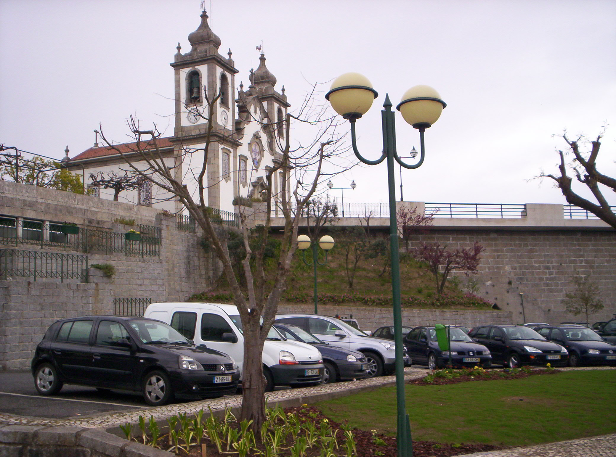 Church in Santa Comba Dão, Portugal